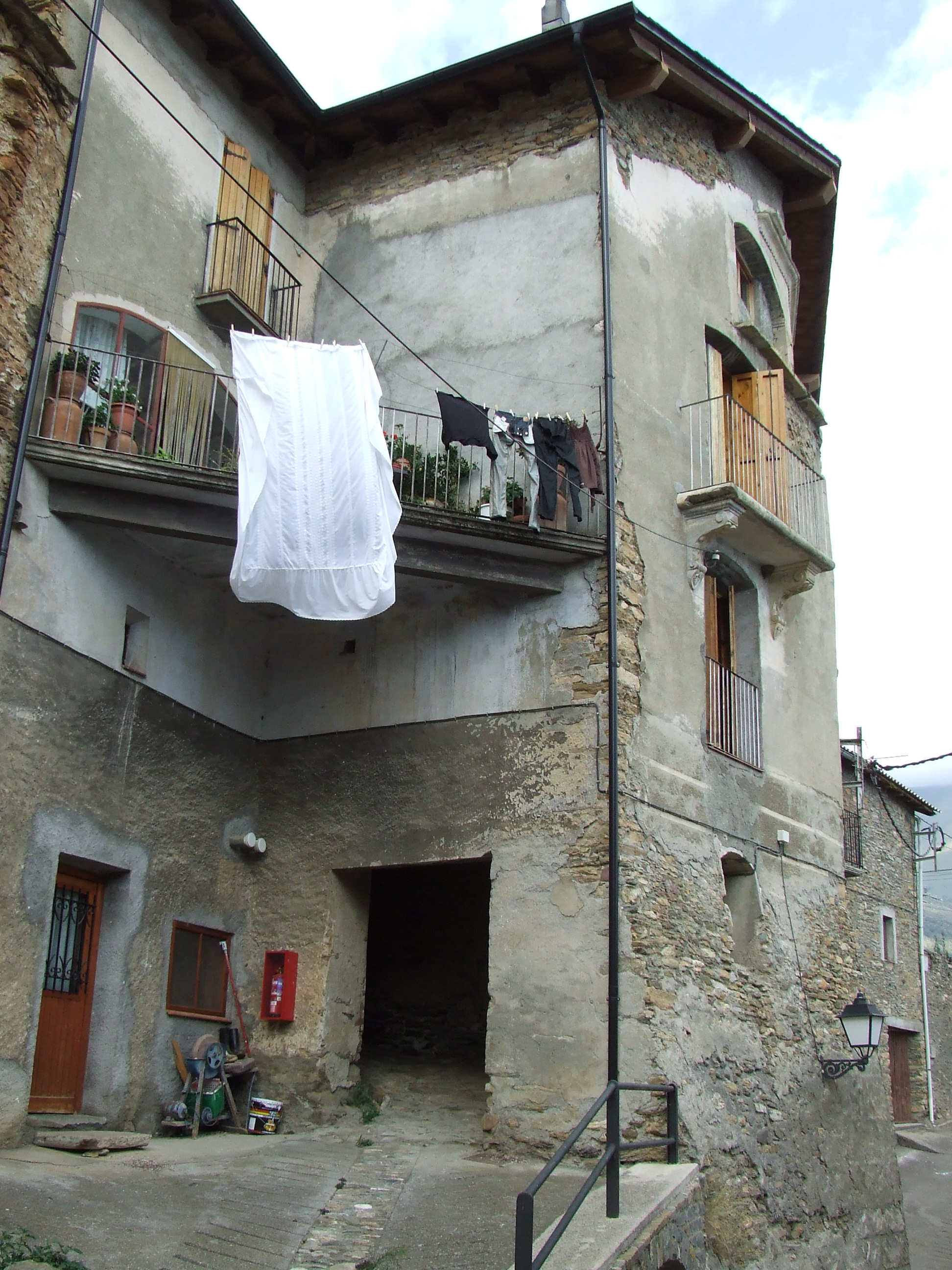 Portal del poble d'Astell (part de fora) (la Torre de Cabdella, Pallars Jussà)